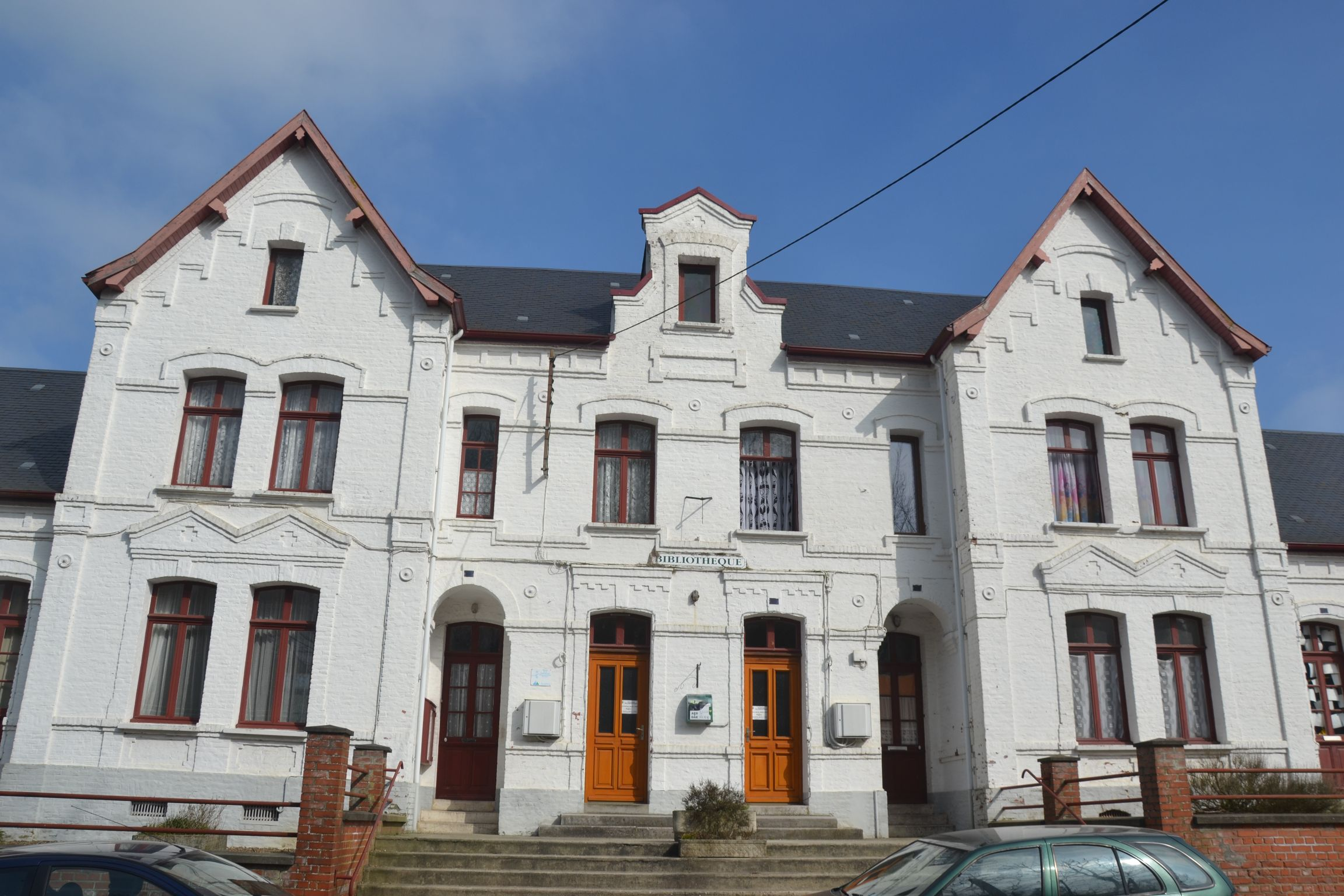 Bâtiment daté de 1881 abritant la mairie, l'école et la bibliothèque de Créquy